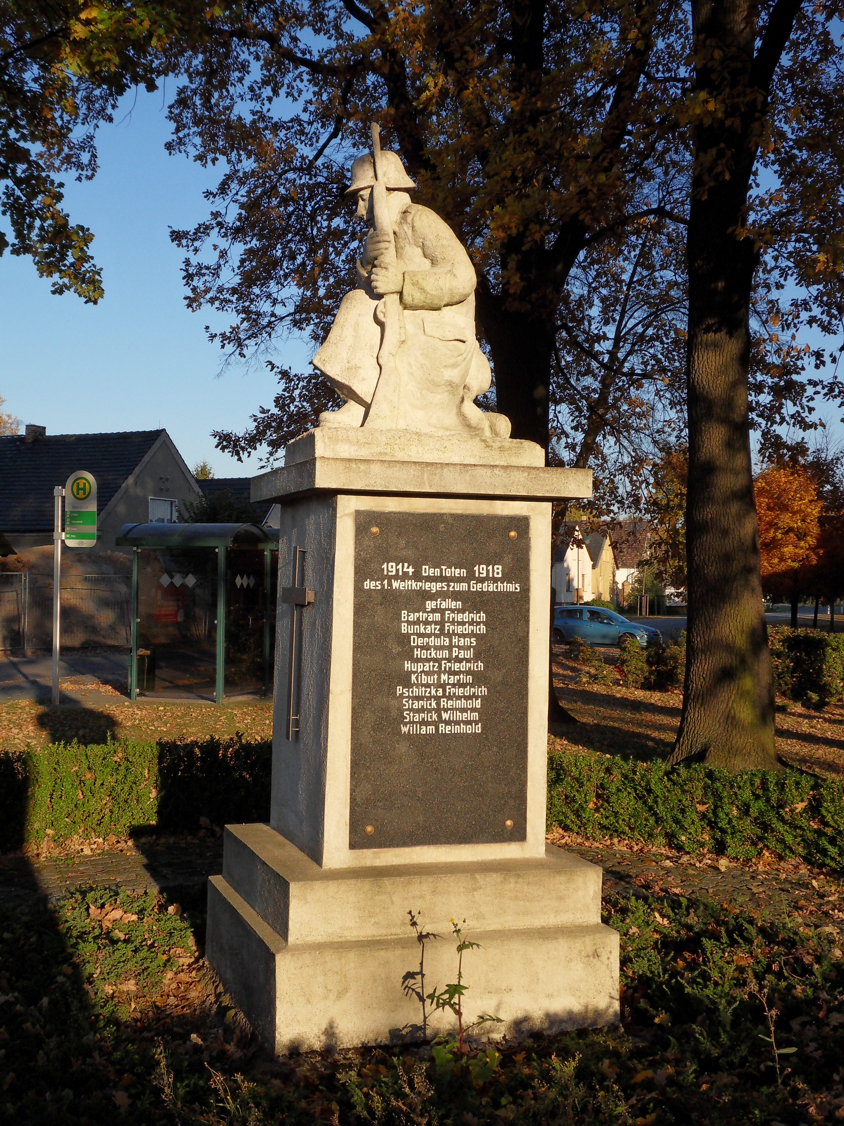 Kriegerdenkmal für die Gefallenen des Ersten Weltkriegs in Bärenbrück, Gemeinde Teichland